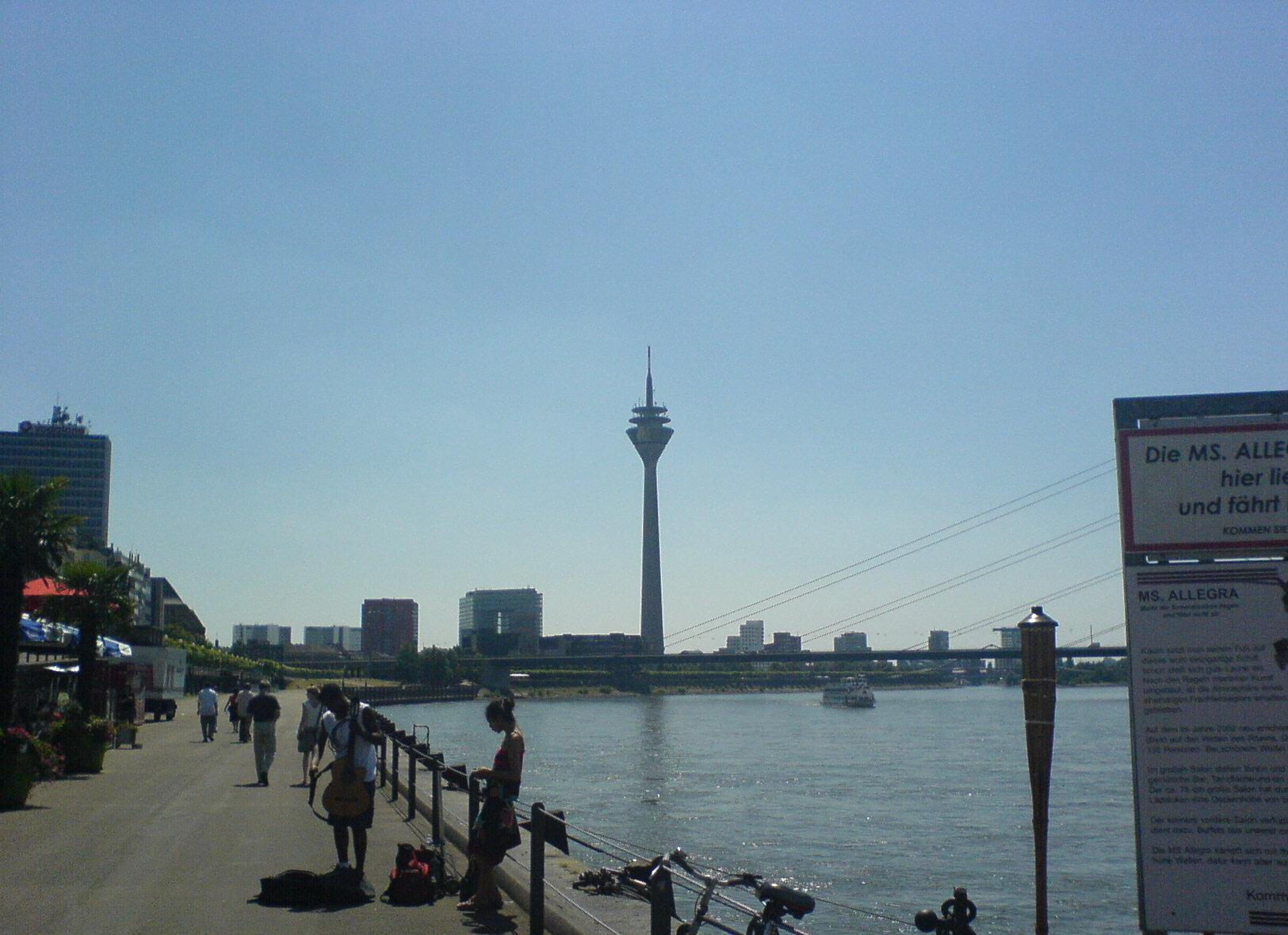 Rheinturm in Düsseldorf. The author is me, Jostein Torstensen.